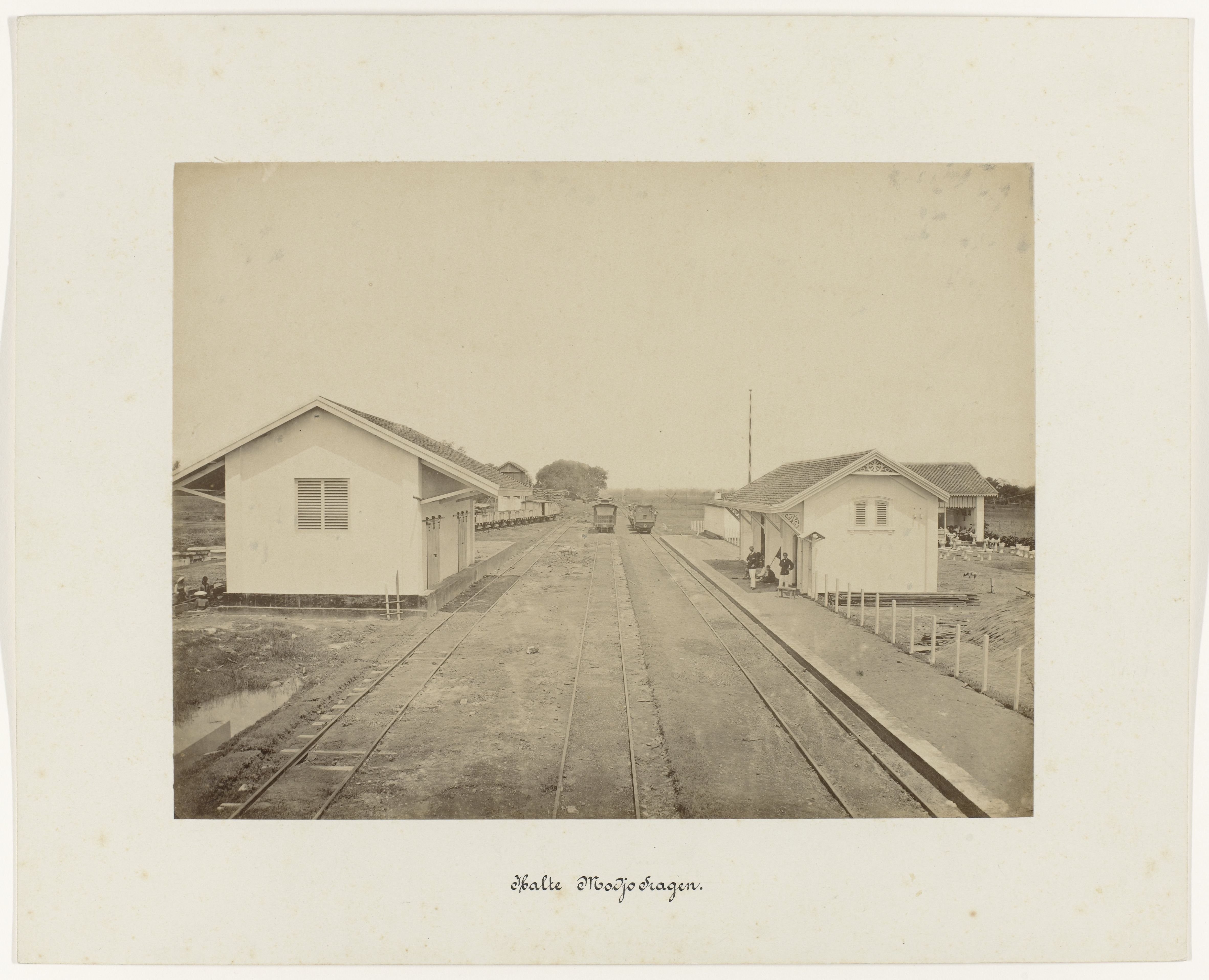 IdentificatieTitel(s): Halte Modjosragen (titel op object)Staatsspoorwegen op Java (serietitel)Objecttype: foto Objectnummer: NG-1988-26-36Omschrijving: De halte Modjosragen, op de sporen bij het station enkele treinwagons. Onderdeel van een groep van 62 foto's in een doos met het opschrift "Staatsspoorwegen op Java" uit 1888.VervaardigingVervaardiger: fotograaf: anoniemPlaats vervaardiging: JavaDatering: 1880 - 1888Fysieke kenmerken: albuminedrukMateriaal: fotopapier Techniek: albuminedrukAfmetingen: foto: h 175 mm × b 210 mmkarton: h 250 mm × b 230 mmOnderwerpWanneer: 1880 - 1888Waar: JavaVerwerving en rechtenVerwerving: aankoop 30-aug-1988Copyright: Publiek domein